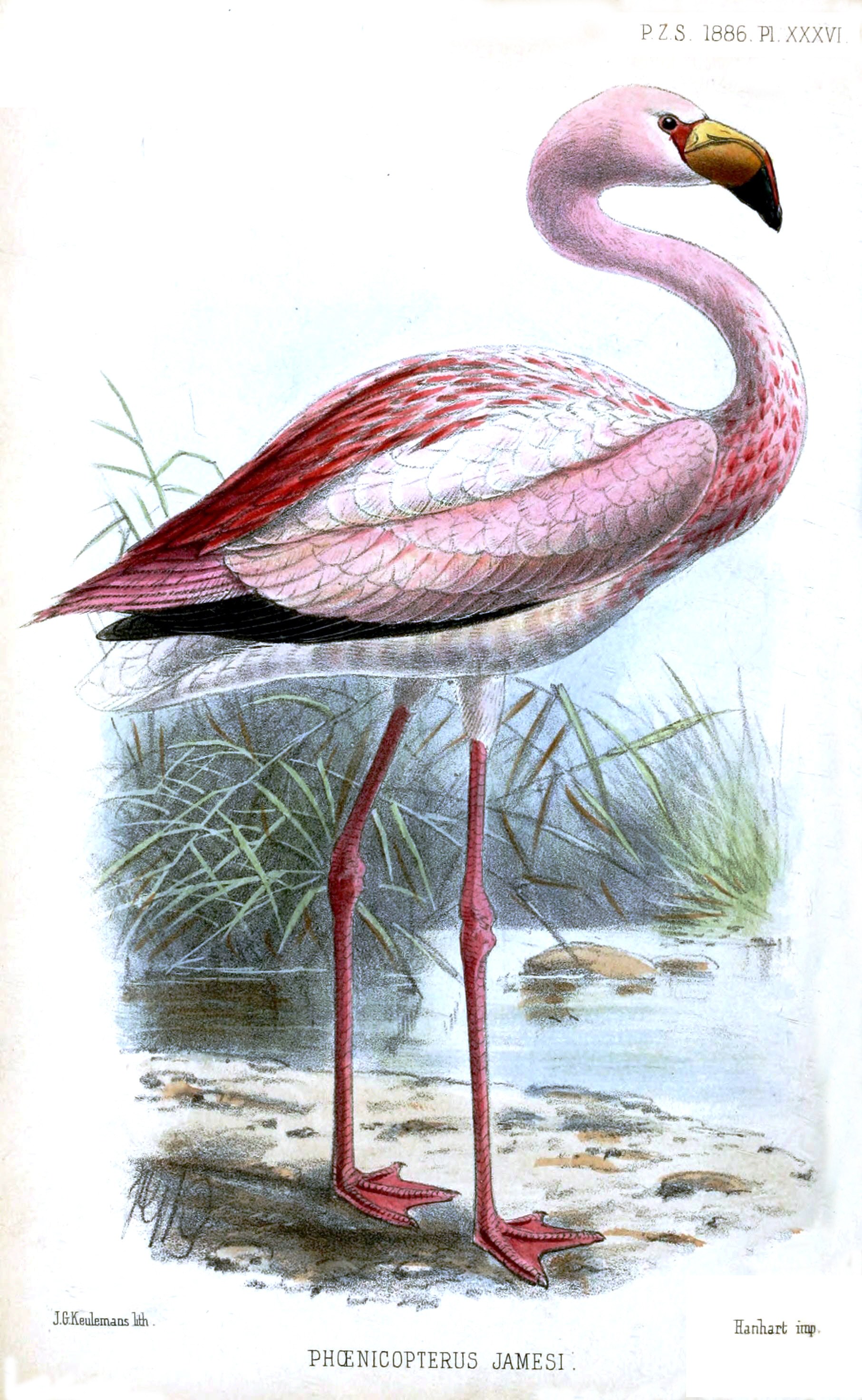 James Flamingo